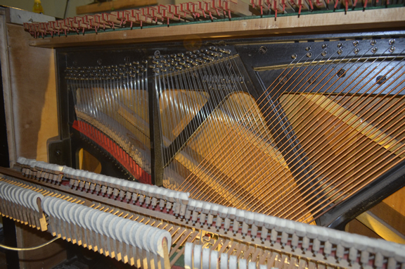 De 2 stellen pianosnaren die elkaar kruisen en die vooral 'bichords' en 'monochords' gebruiken.